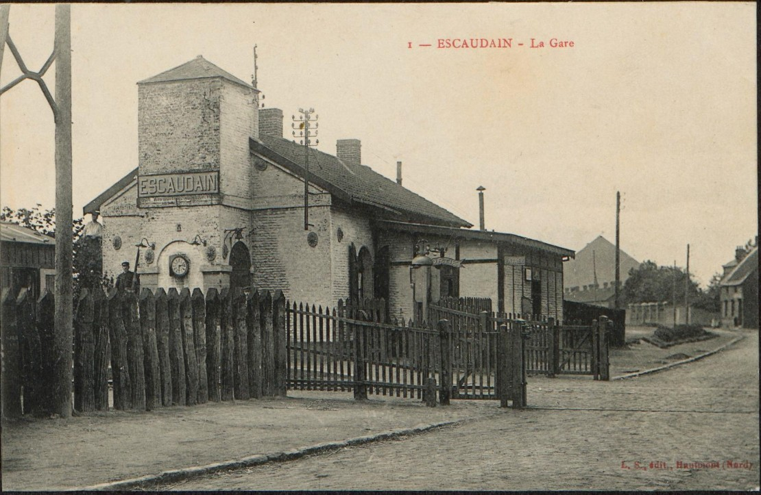 Carte postale de la Gare d'Escaudain du début du XXeme siècle.